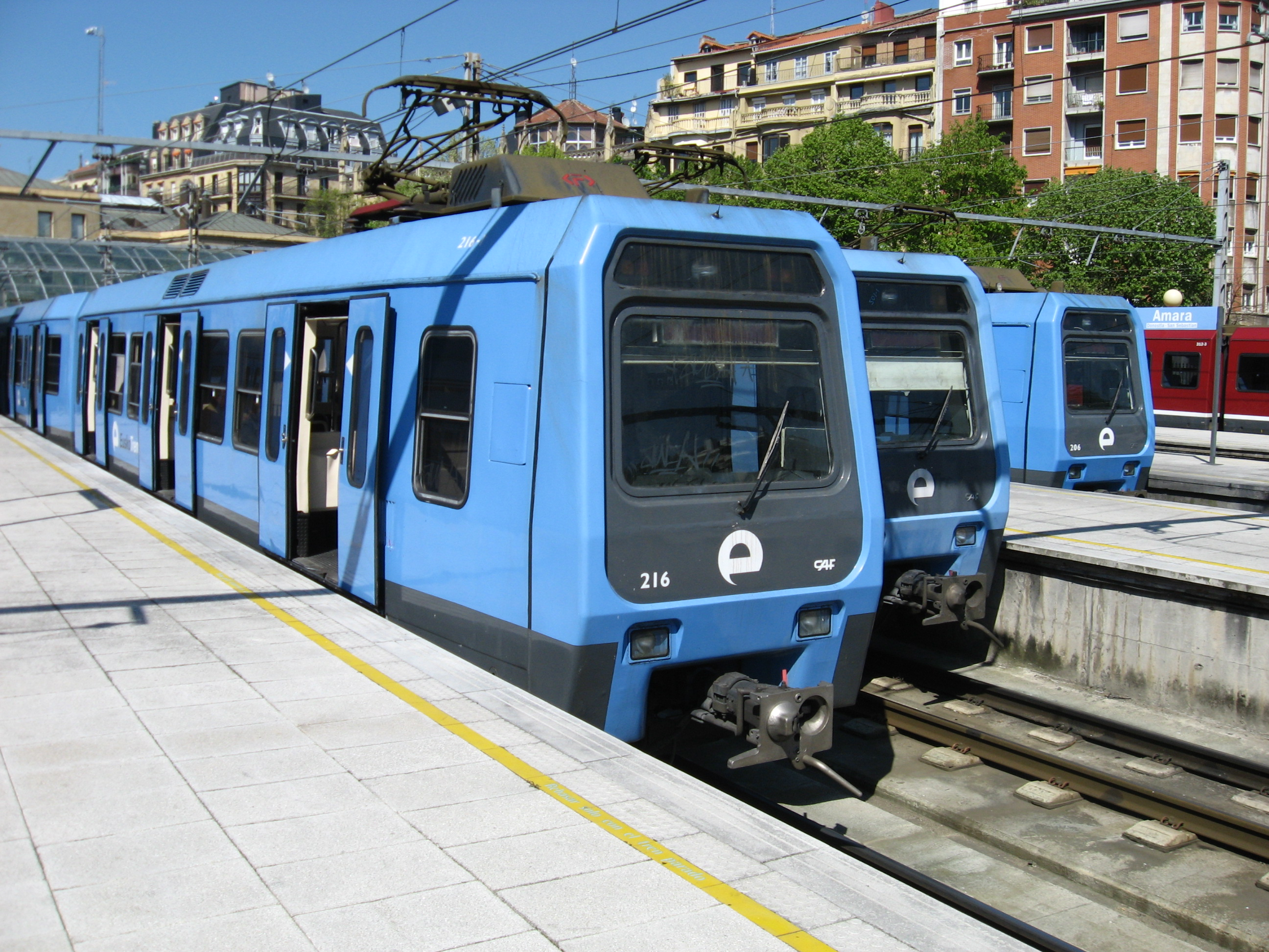 Main Euskotren railway station in San Sebastián (Donostia)